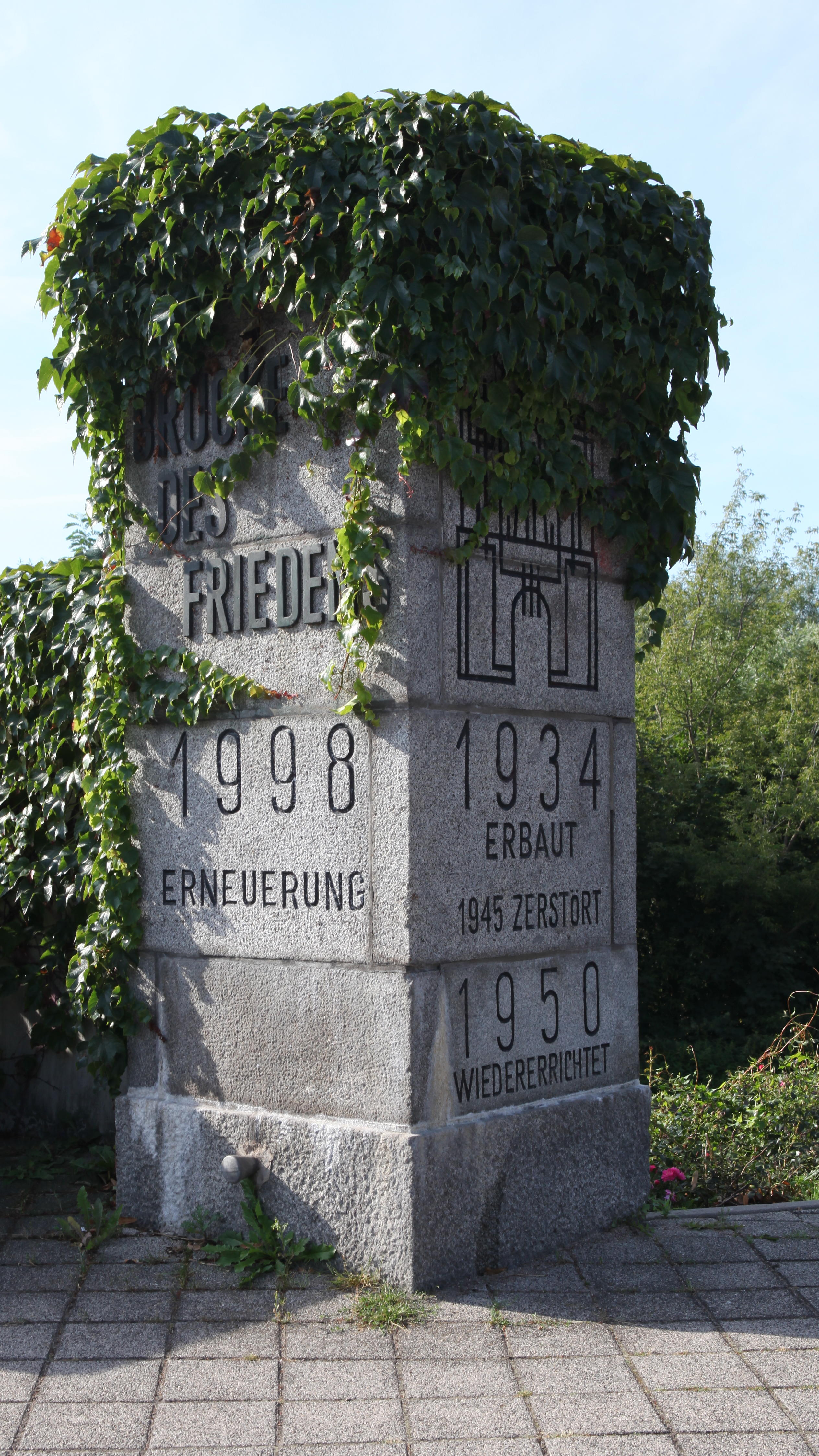 Südliche Brücke des Friedens über die Alte Elbe in Magdeburg